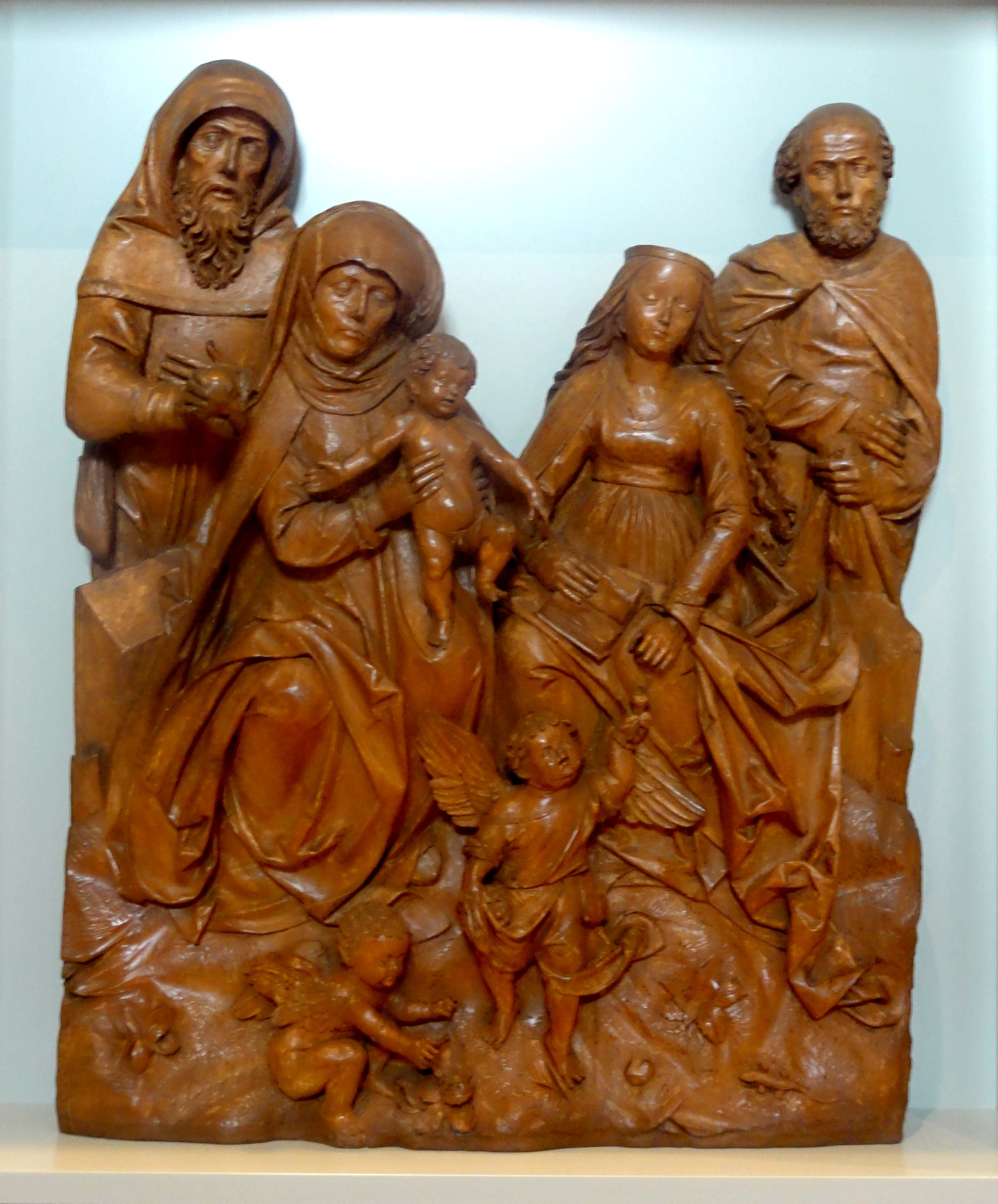 Sammlung Dursch, Dominikanermuseum Rottweil - Objektbeschreibung siehe Dateititel.